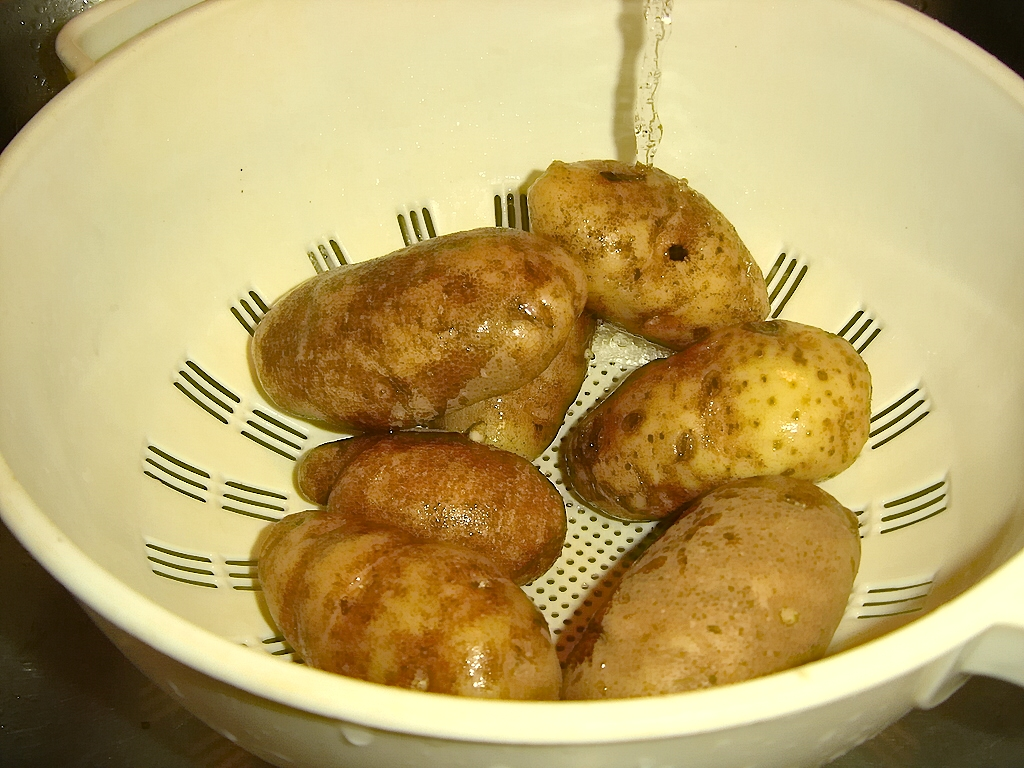 Waschen von Kartoffeln (vorm Schälen) unter leicht fließendem Wasser, um lose anhaftende Erdreste etc. zu entfernen (hier in einem Durchschlag, in der Küchenspüle).